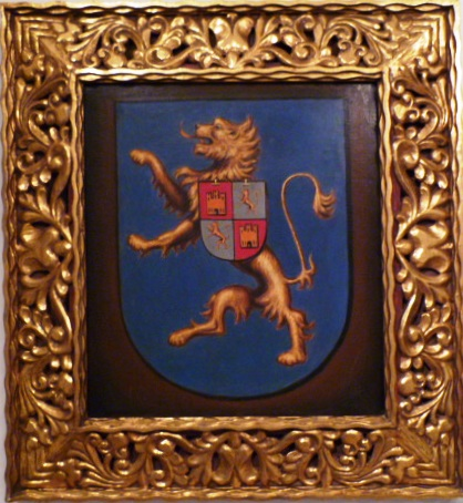 Actual Escudo de Armas de Rionegro